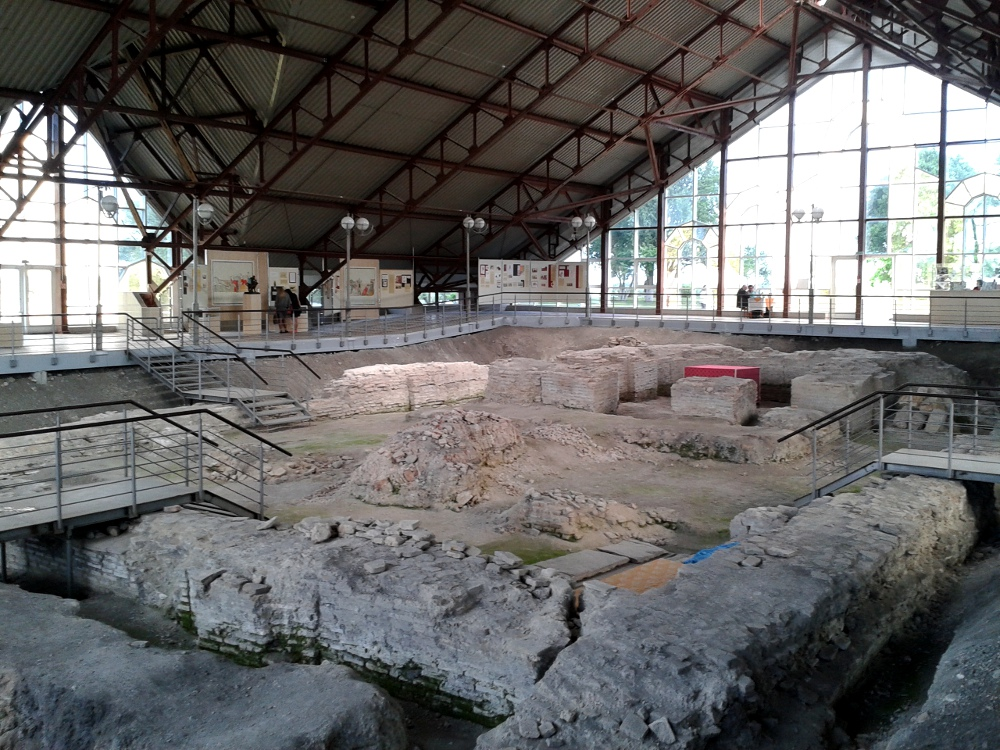 Zabezpieczone fundamenty Soboru w Turowie